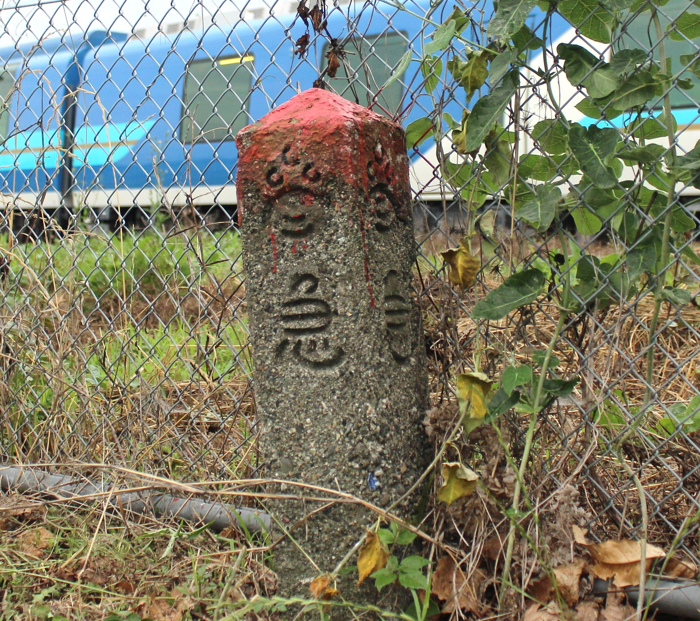 参宮急行境界